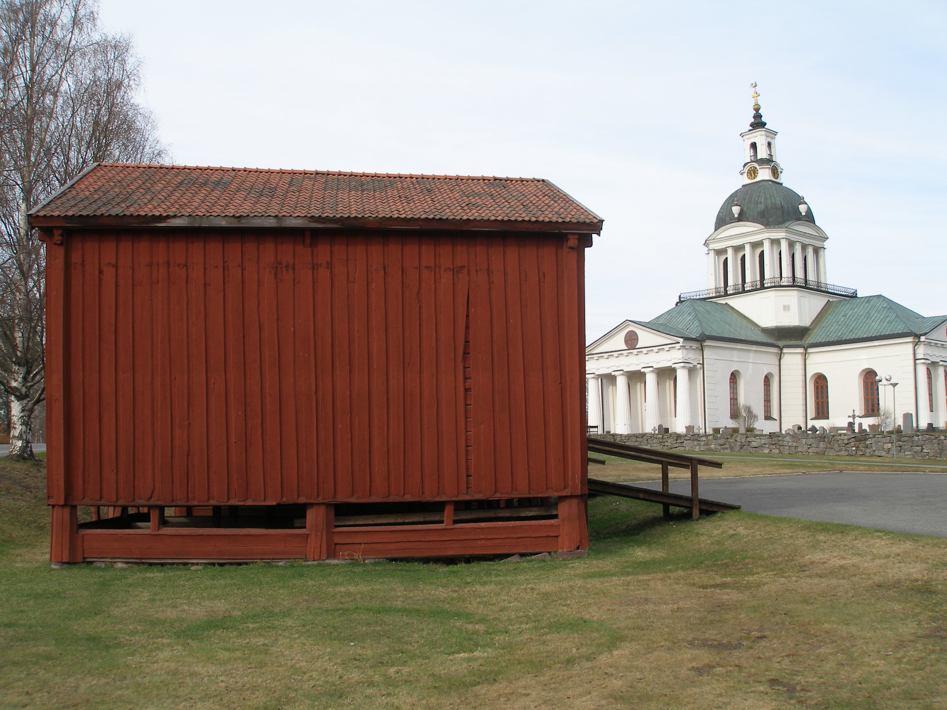 Förrådsbodar mellan Lejonströmsbron och Landsförsamlingskyrkan i Skellefteå. Bodarna sägs ha kulhål från skottlossning från kriget mellan Sverige och Ryssland vid bron 1809.